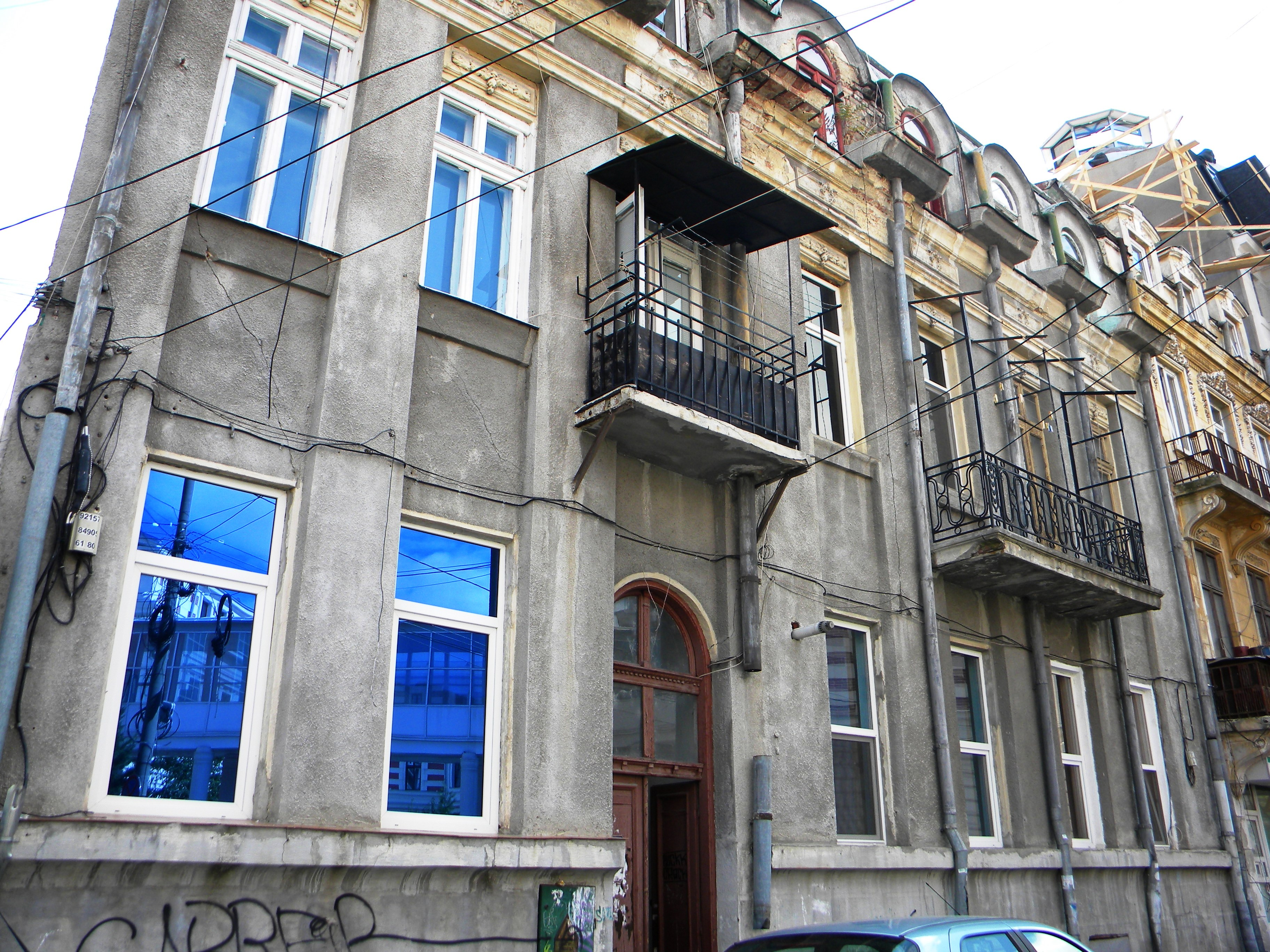 Bucuresti, Romania, Casa pe Str. Slanic nr. 6, sect. 3